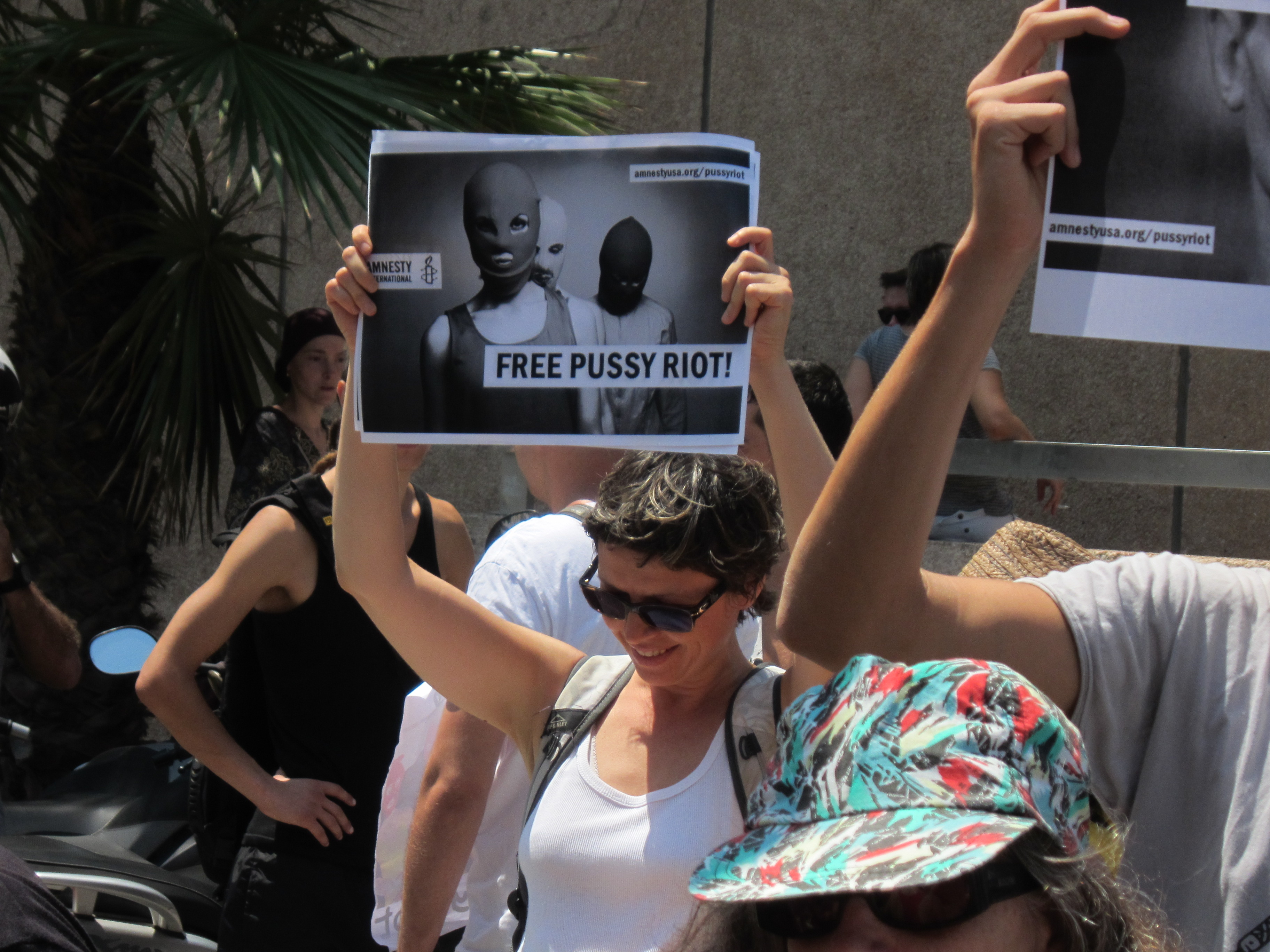 הפגנה לשחרור חברות להקת פוסי ריוט שהתקיימה מול בניין שגרירות רוסיה בתל אביב - אוגוסט 2012